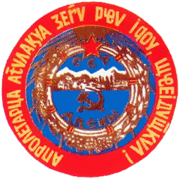 Coat of arms of Abkhazian SSRMotto : Апролетарца аτ̆ѵлақуа ӡег̆ѵ рҿѵ iqoy, щҿeiдѵщкѵл!Name: ССР Аҧсны